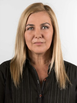 Pamela Jiles Moreno en la fotografía oficial de diputados periodo 2018-2022.Fotos: Christel Andler, René Lescornez, Johanna Zárate